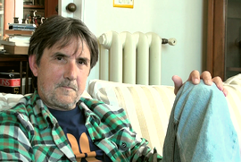 Ramon Saizarbitoria idazlea 2010ean